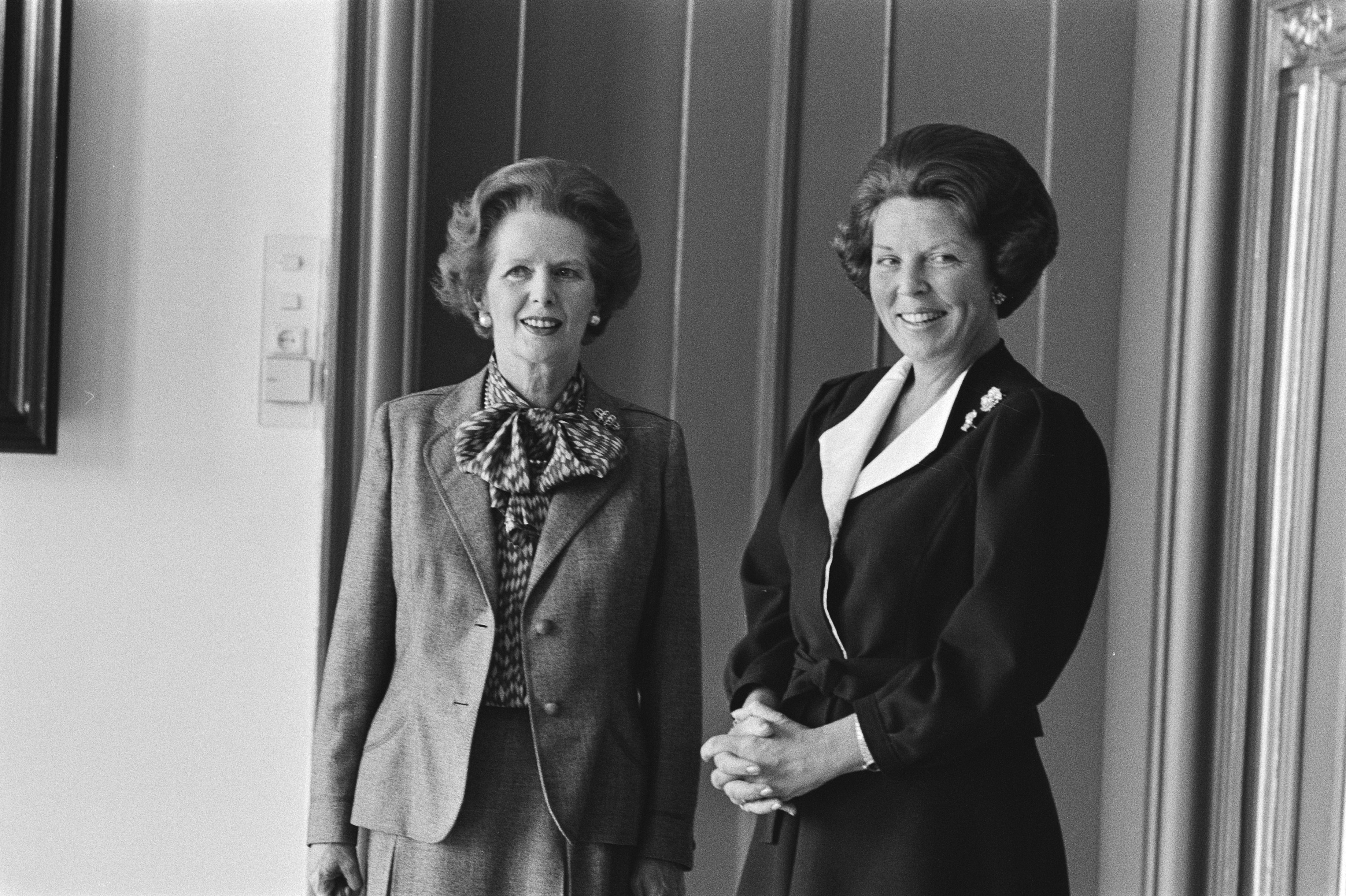 Collectie / Archief : Fotocollectie Anefo Reportage / Serie : Bezoek Engelse premier Margaret Thatcher Beschrijving : Premier Thatcher (l) en koningin Beatrix Datum : 19 september 1983 Trefwoorden : koninginnen, ministers-presidenten, portretten Persoonsnaam : Beatrix (koningin Nederland), Thatcher, Margaret Fotograaf : Bogaerts, Rob / Anefo Auteursrechthebbende : Nationaal Archief Materiaalsoort : Negatief (zwart/wit) Nummer archiefinventaris : bekijk toegang 2.24.01.05 Bestanddeelnummer : 932-7042